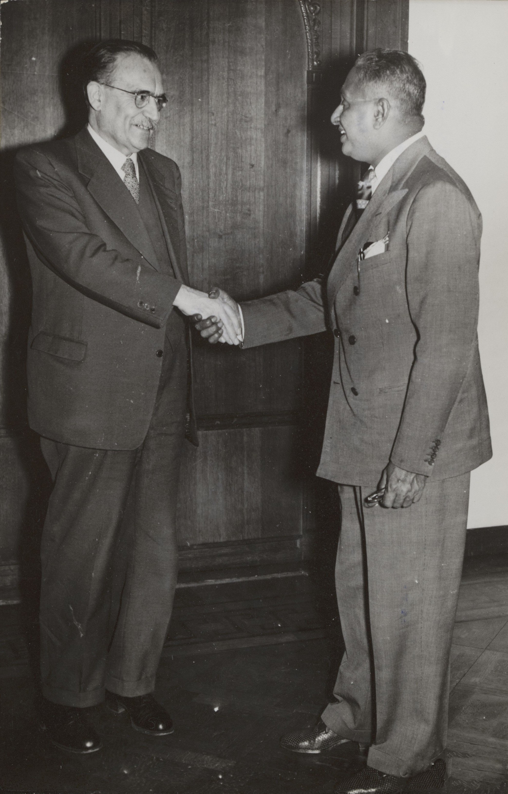 Collectie / Archief : Fotocollectie Elsevier Reportage / Serie : [ onbekend ] Beschrijving : premier van ceylon op bezoek in ons land Datum : 12 februari 1955 Locatie : Den Haag, Zuid-Holland Trefwoorden : bezoeken, minister-presidenten, ontvangsten Persoonsnaam : drees w, kotelawala j Fotograaf : Fotograaf Onbekend / Anefo Auteursrechthebbende : Nationaal Archief Materiaalsoort : Foto (zwart/wit) Nummer archiefinventaris : bekijk toegang 2.24.05.02 Bestanddeelnummer : 091-0363